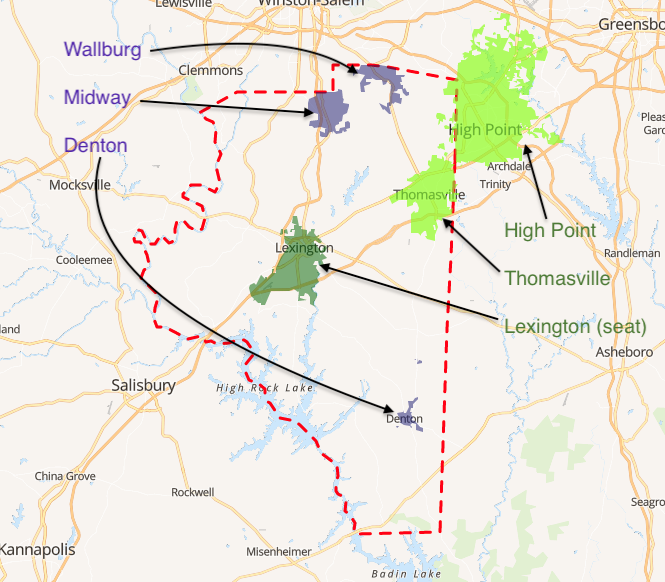 carte réalisée sur umap [1]